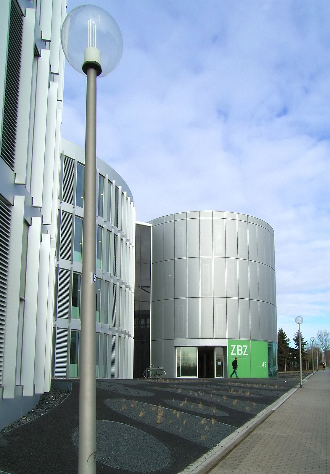 ZBZ Witten